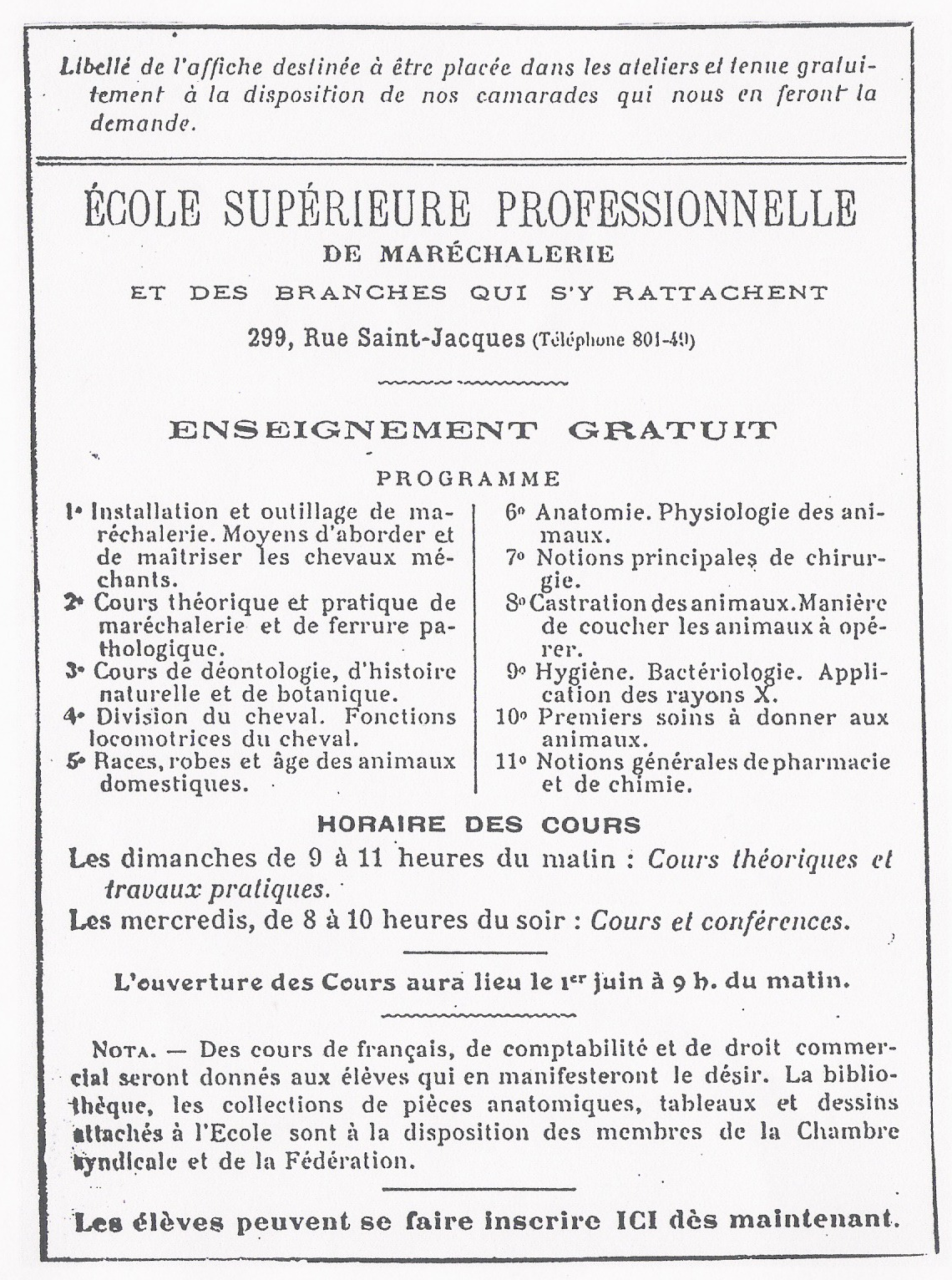 Programme de l'Ecole de maréchalerie publié et dénoncé par Emmanuel Leclainche, en 1903, dans la Revue générale de médecine vétérinaire